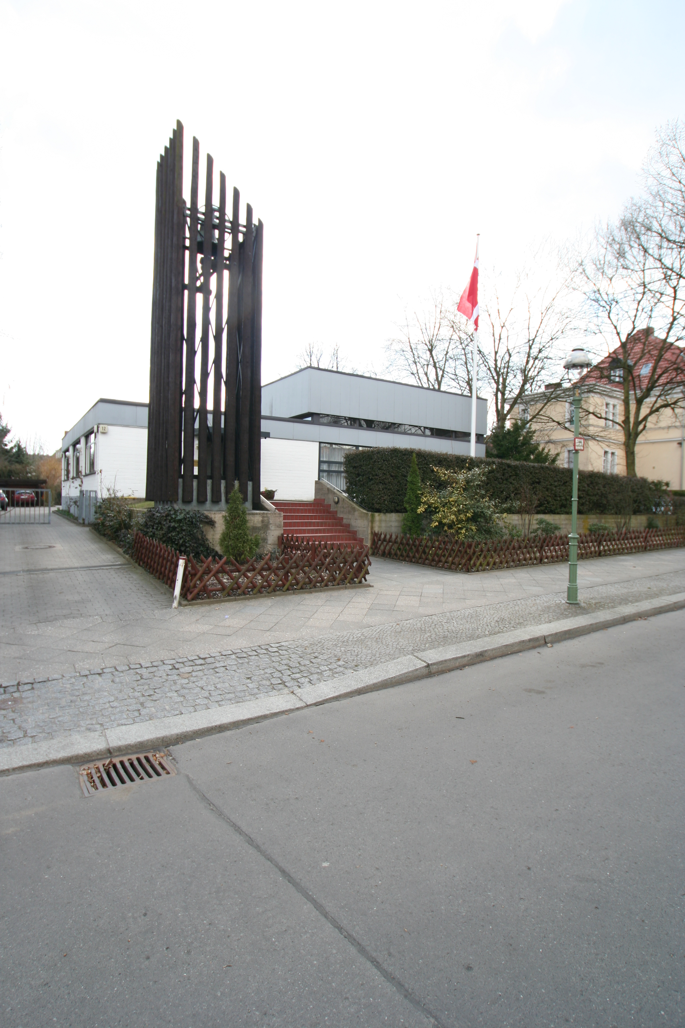 Christians-Kirken, Berlin, Germany